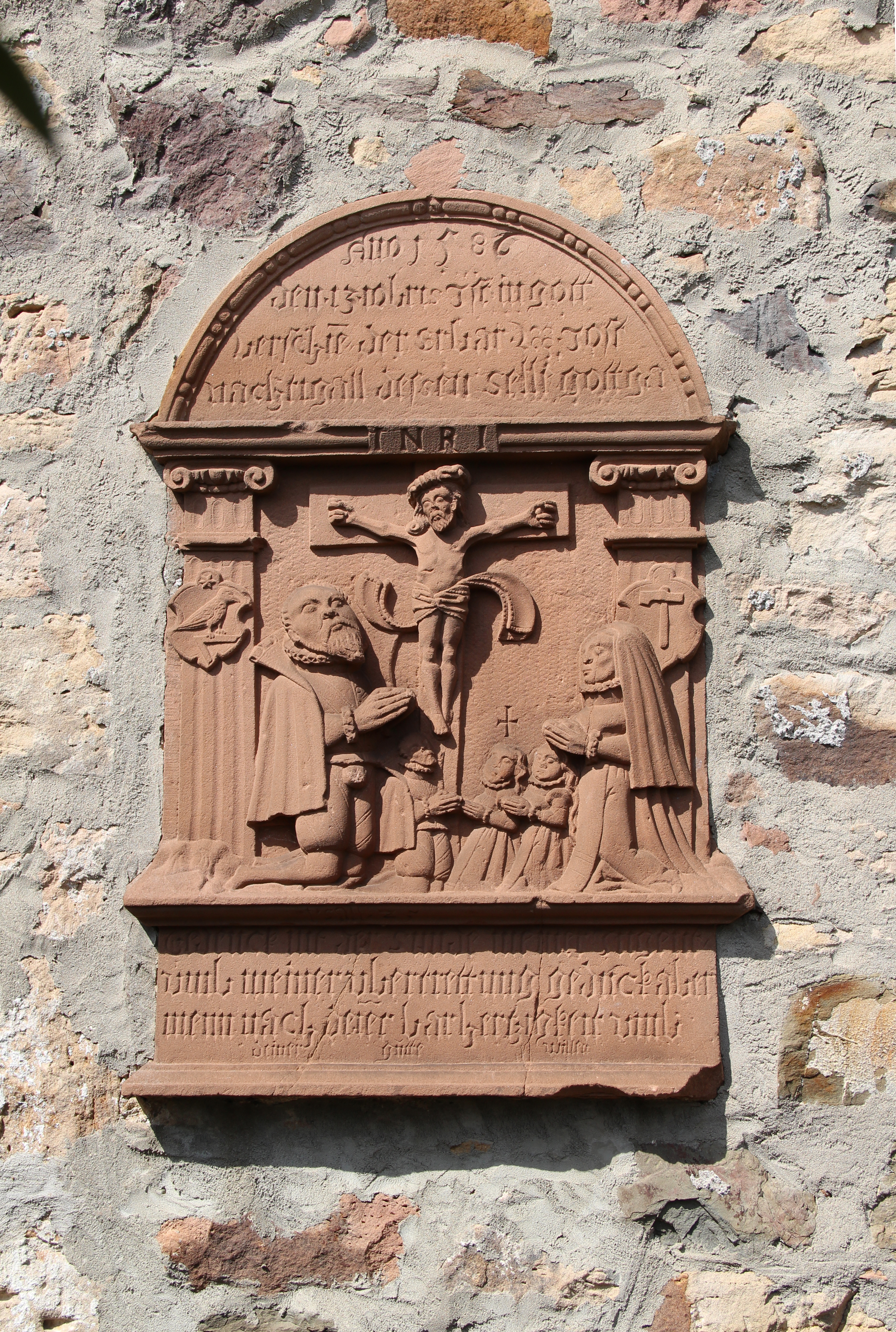 Epitaph an der äußern Südwand der Kirche in Salzböden. Weitergehende Informationen bei LAGIS